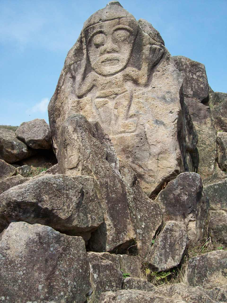 La Chaquira es quizás el sitio más impresionante de San Agustín. Mirando hacia el profundo cañón del rió Magdalena y talladas en su sitio sobre las altas peñas, se encuentran varias figuras, entre ellas una de características antropomorfas conocida como "La diosa de la Chaquira". Enfrentada al abismos, su expresión se integra al imponente paisaje de manera admirable, evidencia de la maestría de los escultores. La figura principal, con las manos en alto, en posición de adoración, mira hacia el imponente cañón del Rio Magdalena y al sol naciente Alrededor; aparecen también, figuras de simios en movimiento y rostros antropomorfos, casi todos mirando hacia el oriente, como si vigilaran los movimientos del sol.